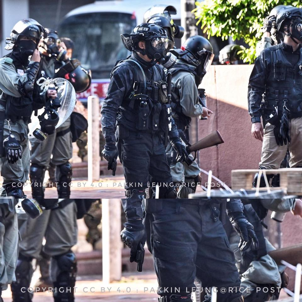 示威者想從理大育才道住科學館道衝出警察防線時，有一速龍曾拔槍出左輪手槍指嚇示威者唔好再向前行